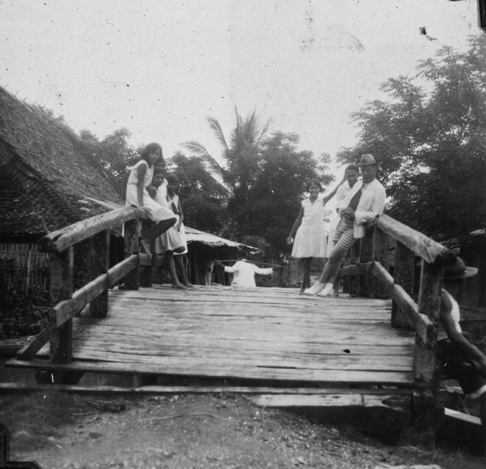 foto. Portret van een groep Indo-Europese meisjes en een man in badkleding, Tjilintjing